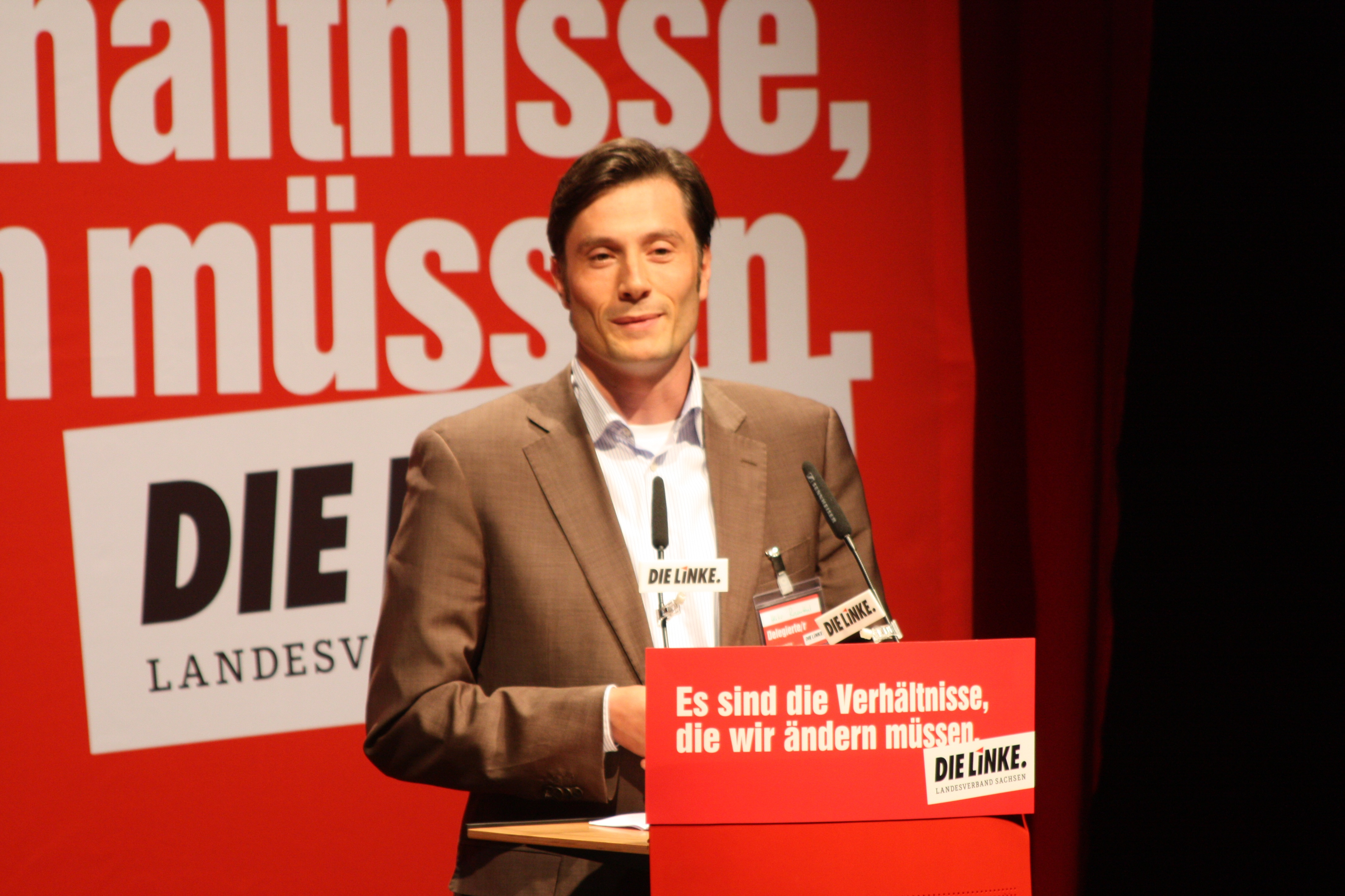 Kandidat für den Landesvorstand